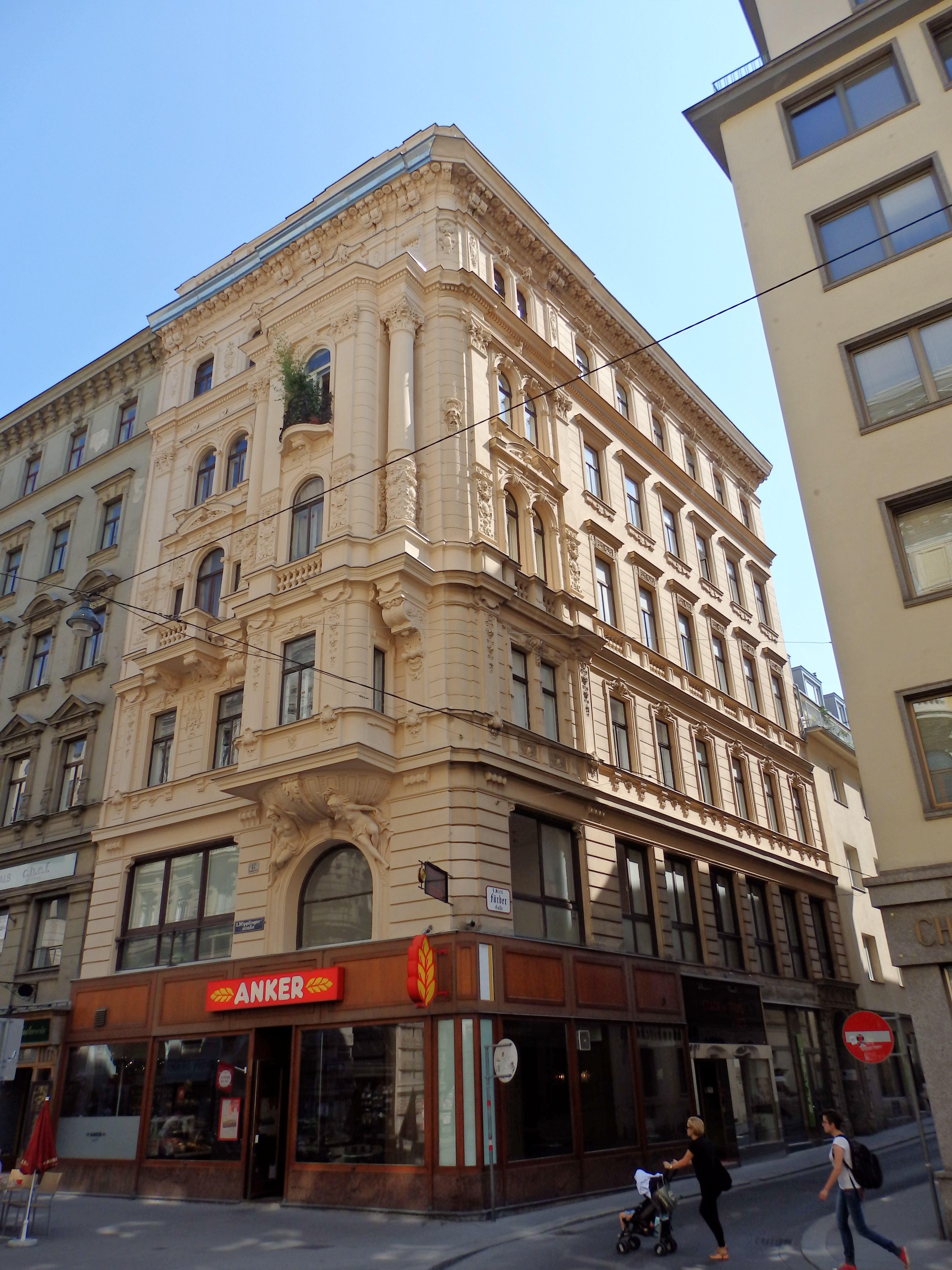 Haus Färbergasse Nr. 10 (1895) von Franz von Neumann, Wien-Innere Stadt